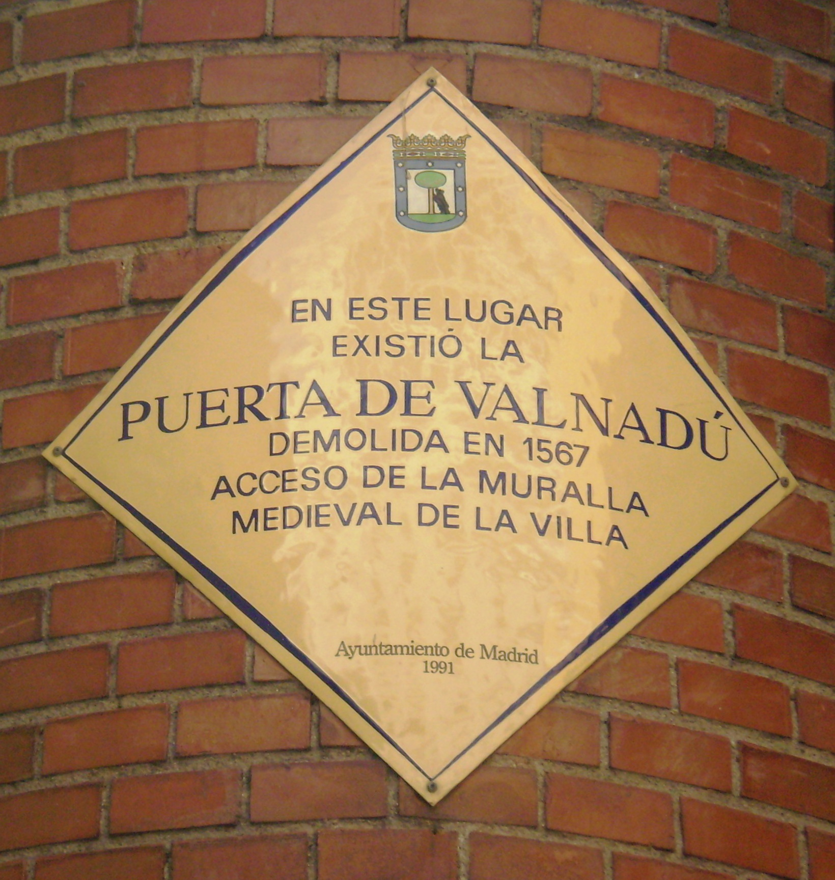 Muralla cristiana de Madrid. Localización de la desaparecida Puerta de Valnadú